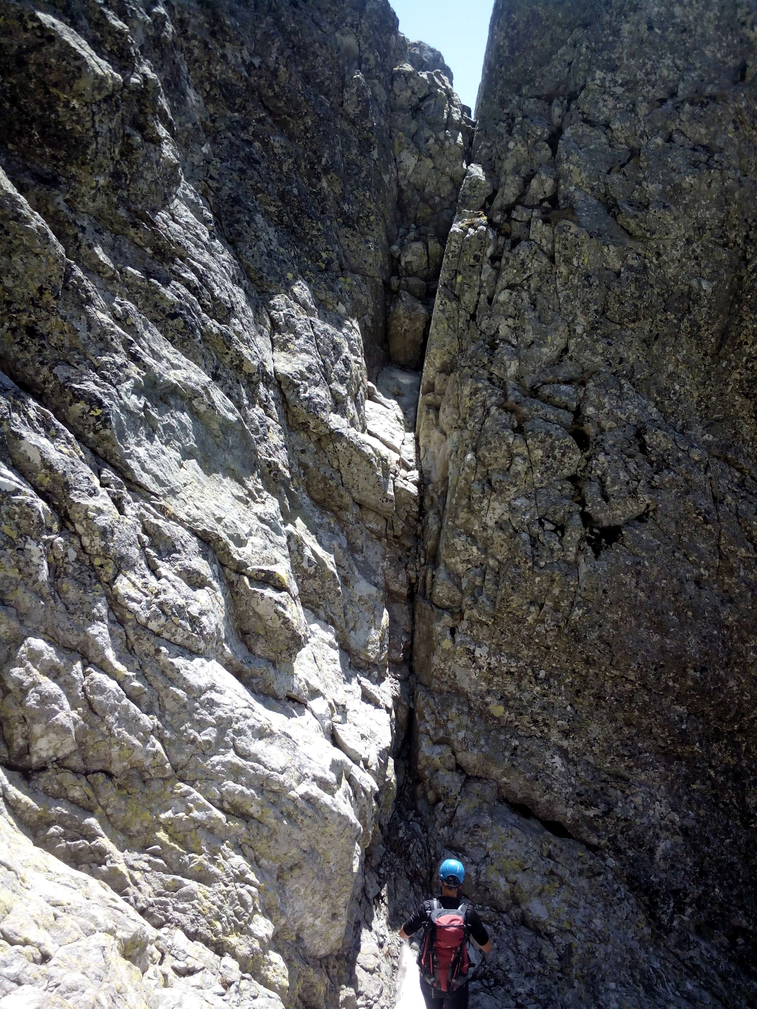 Wejście na Staroleśny Szczyt